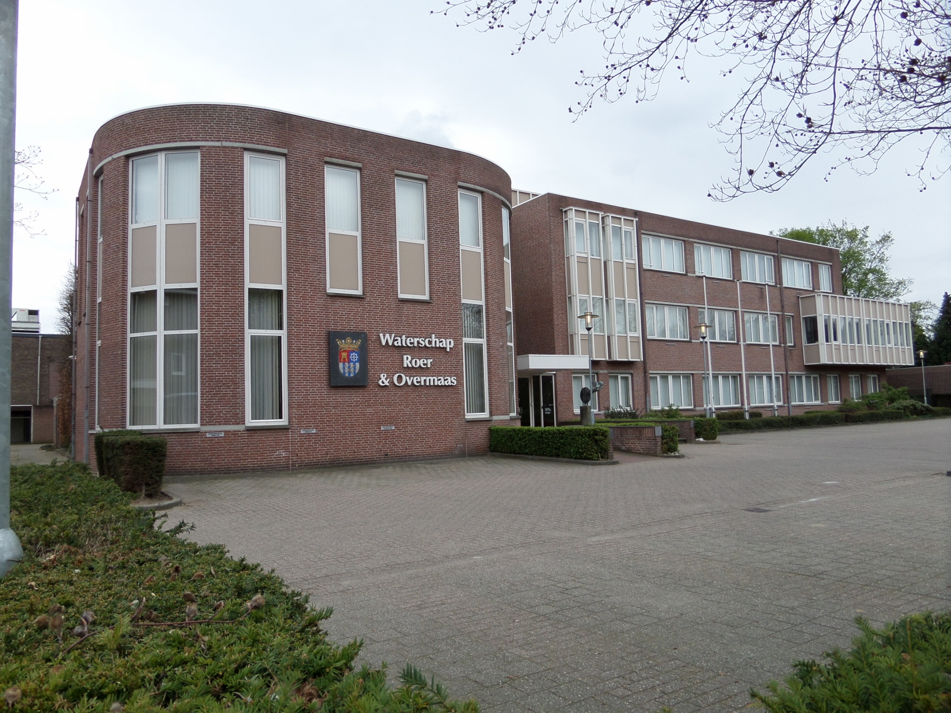 Hoofdkantoor Waterschap Roer en Overmaas, Parklaan 10 te Sittard